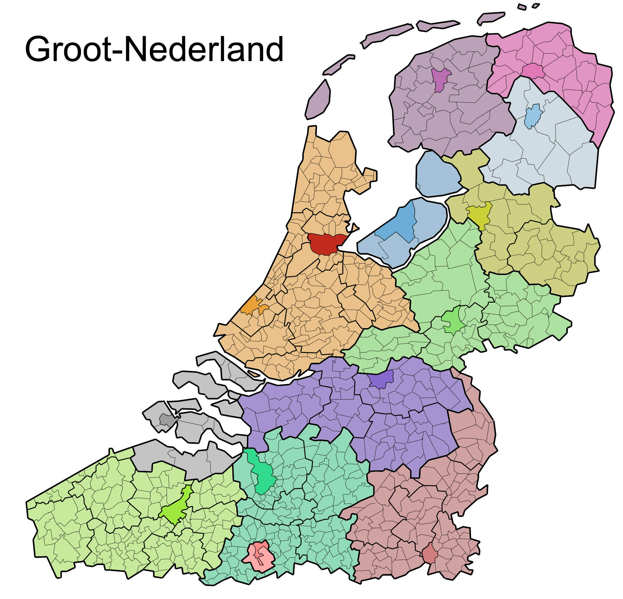 Kaart van mogelijke indeling van Groot-Nederland, eigen makelij, GNU/FDL